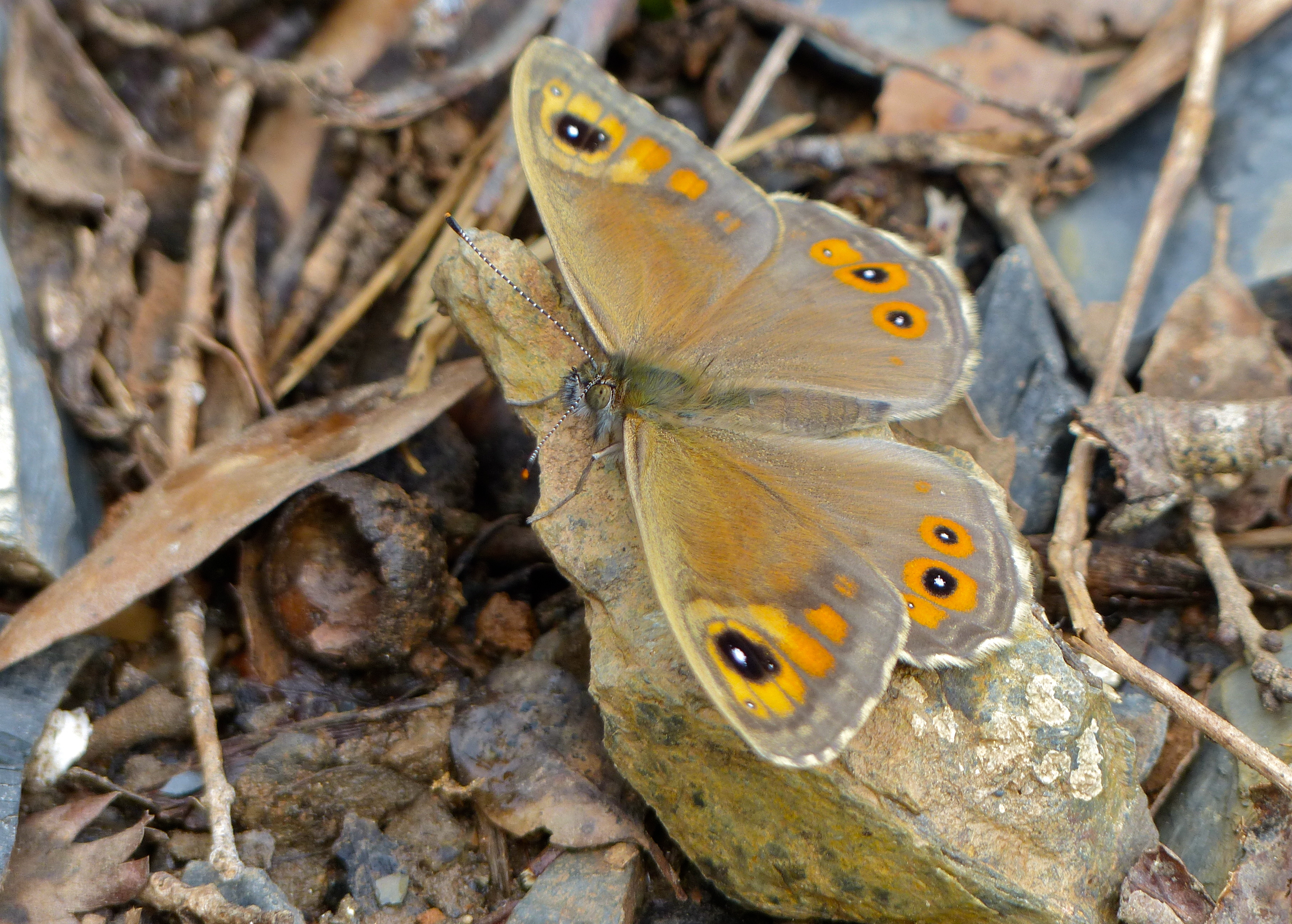 CA-891 Road South of Campollo, La Vega de Liébana, Cantabria, SPAIN